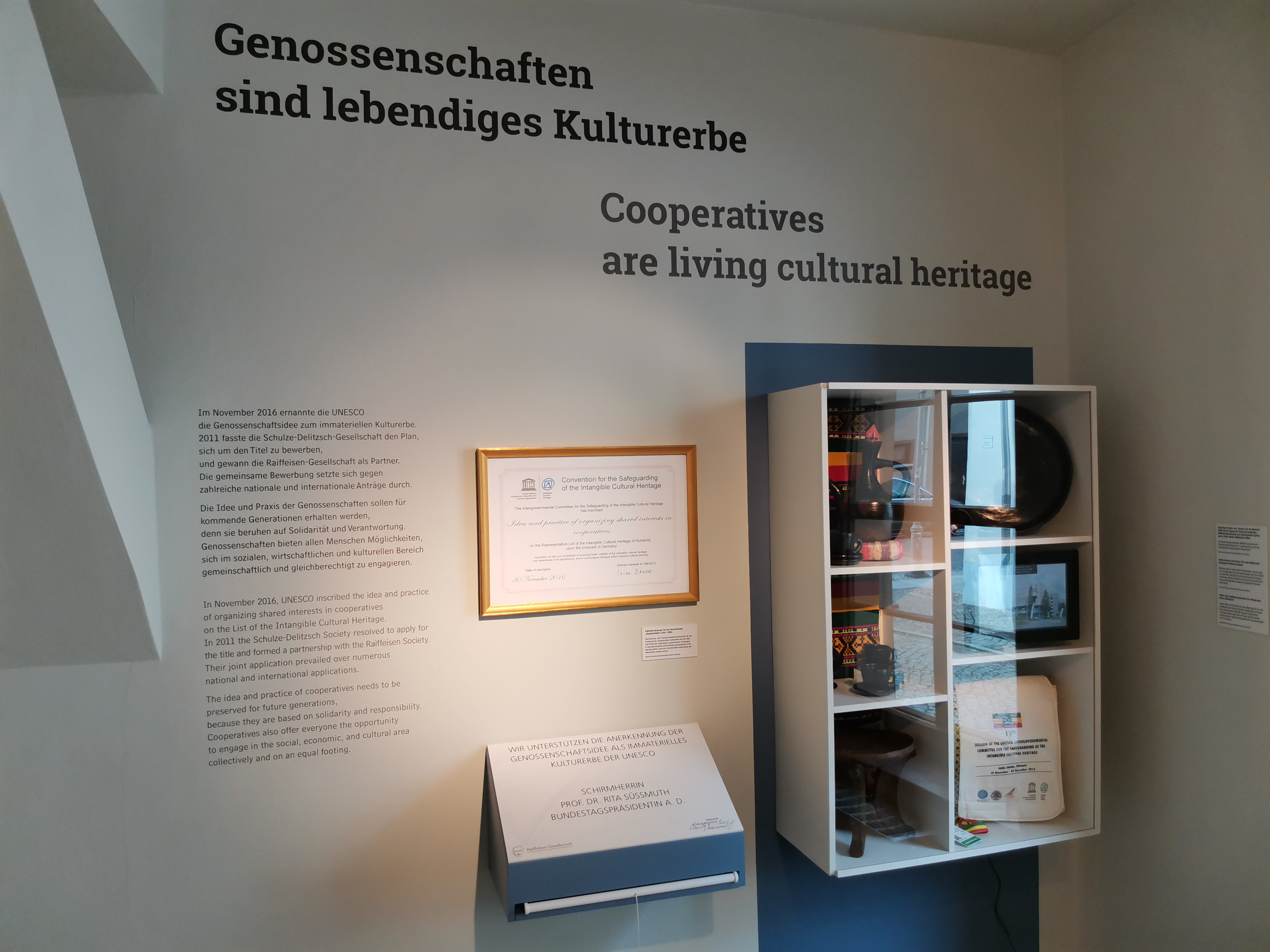 Auf Antrag der Schulze-Delitzsch- und Raiffeisen-Gesellschaft wurde die Genossenschaftsidee 2016 auf die Repräsentative Liste des Immateriellen Kulturerbes der UNESCO gesetzt.